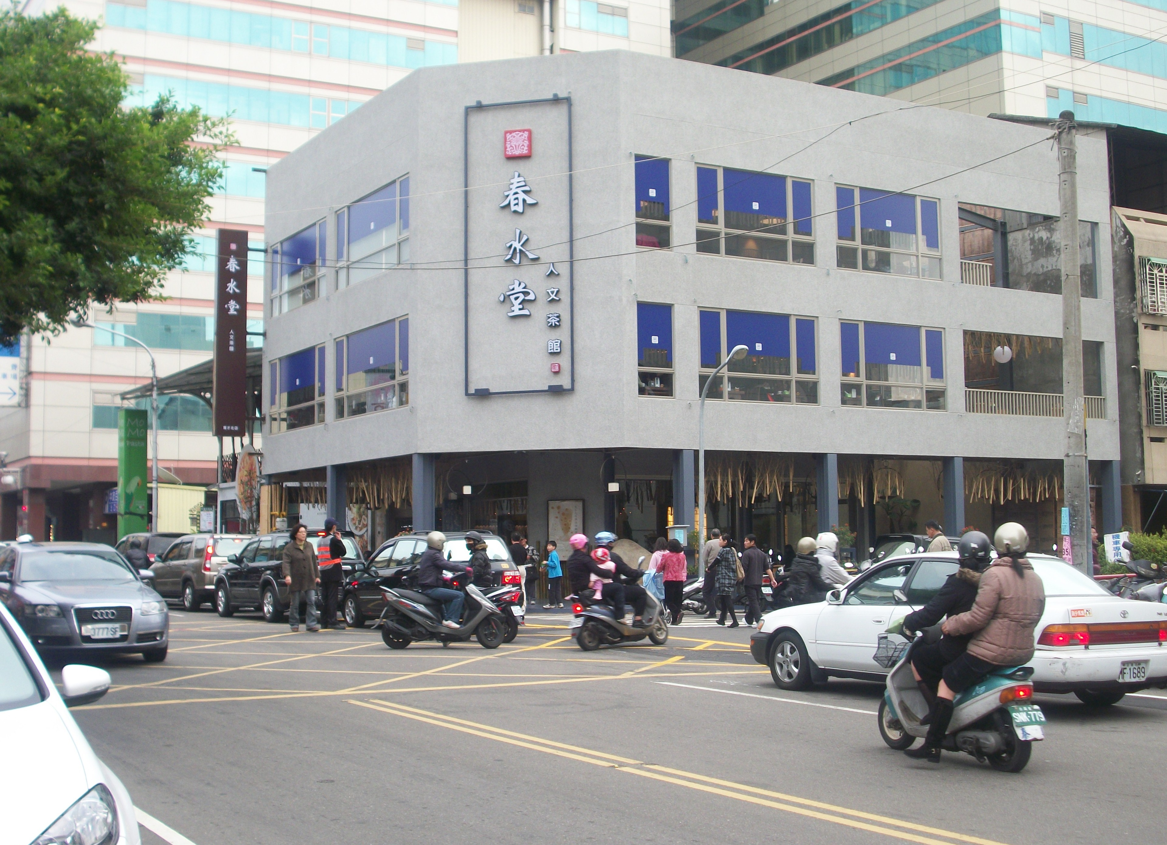 中文（台灣）: 春水堂人文茶館育才北店。